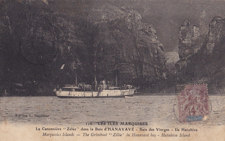 Vue de la canonnière la Zélée en 1910 aux îles Marquises. Carte postale.